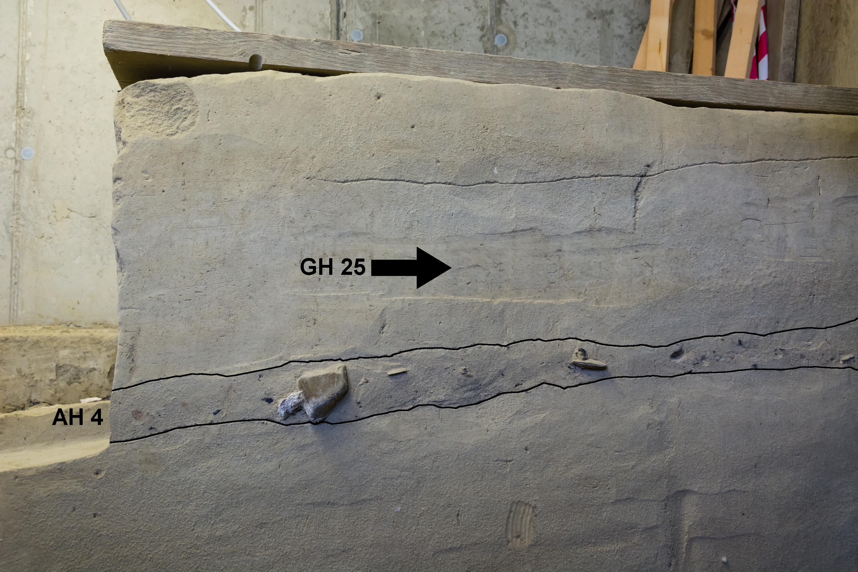 Krems-Wachtberg: Grabungskeller, archäologischer Horizont AH 4 und das feine, doppelte Ascheband des geologischen Horizonts GH 25.